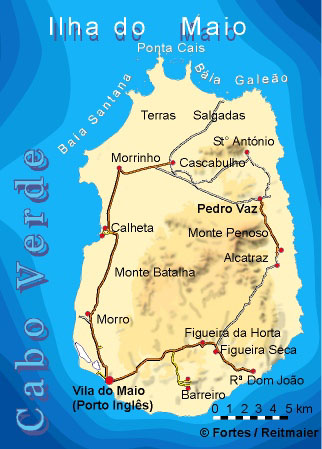 Kartographie: Lucete Fortes / Pitt Reitmaier Design. Pitt Reitmaier Karte vom Urheber hochgeladen